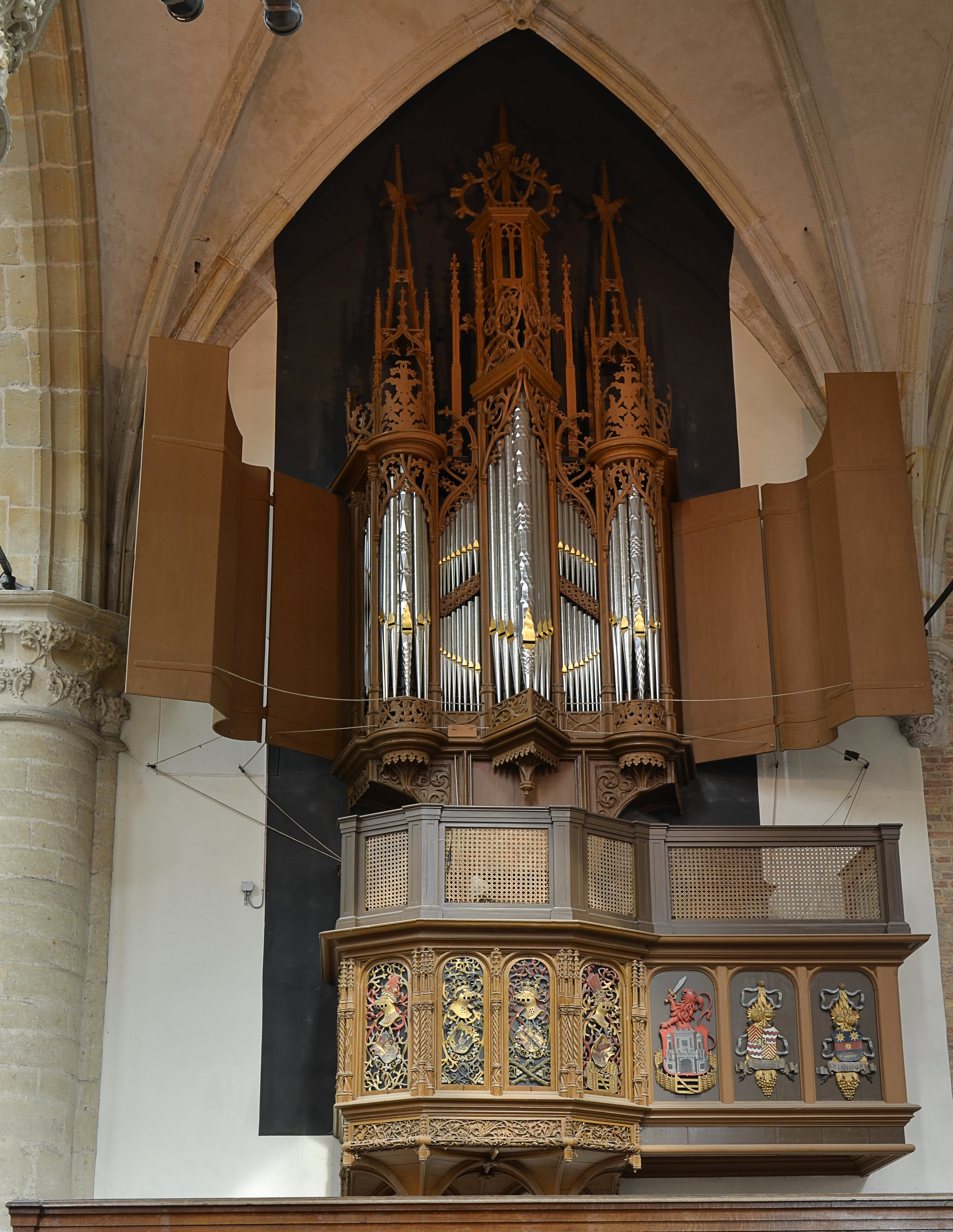 Gotisch koororgel